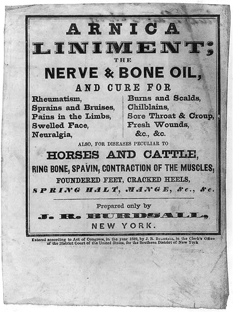 Arnica liniment in USA (1852)